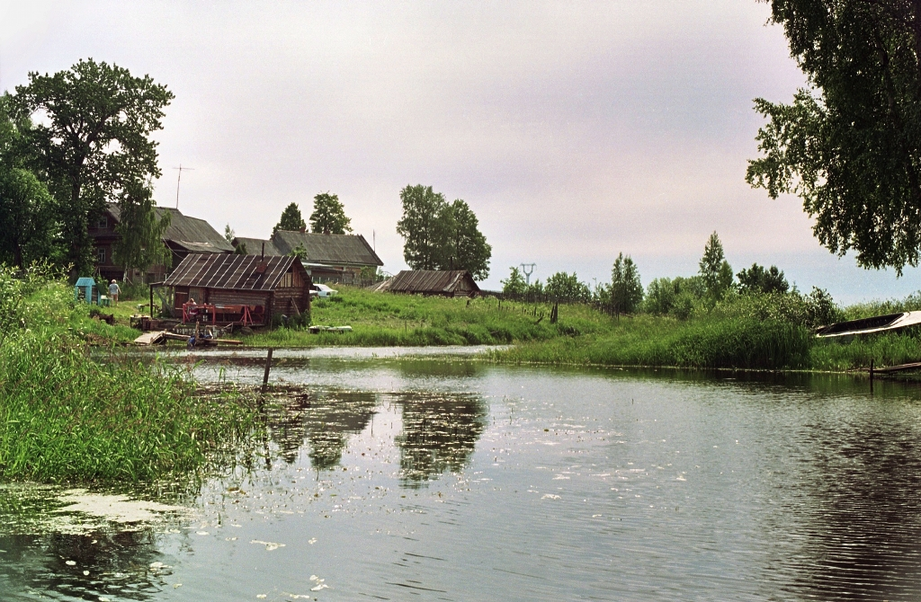 Zenit TTL, kodak gold 200